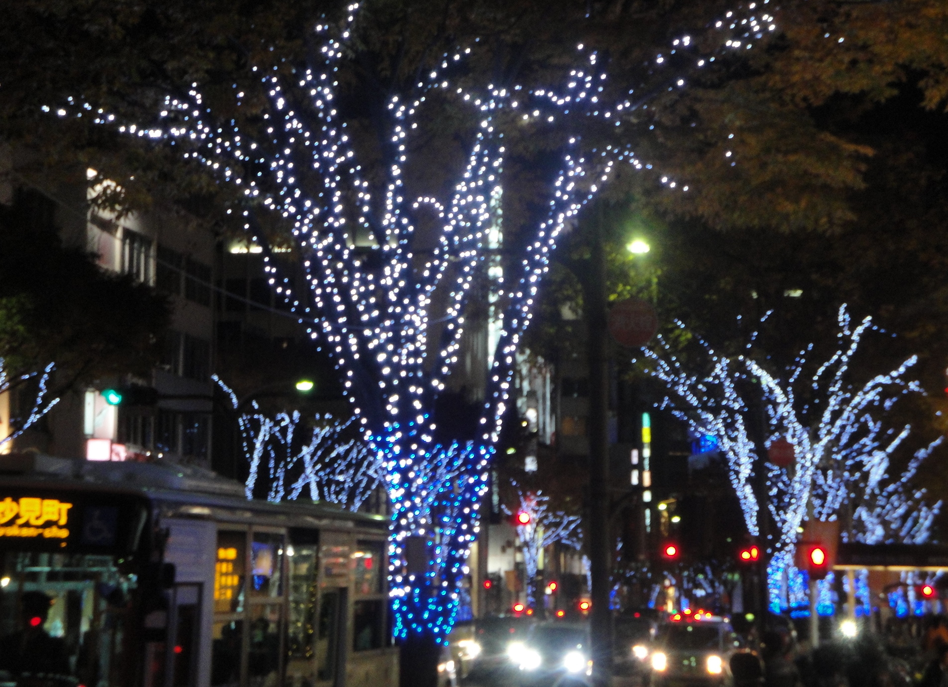 ライトアップされた大津通。矢場町付近。